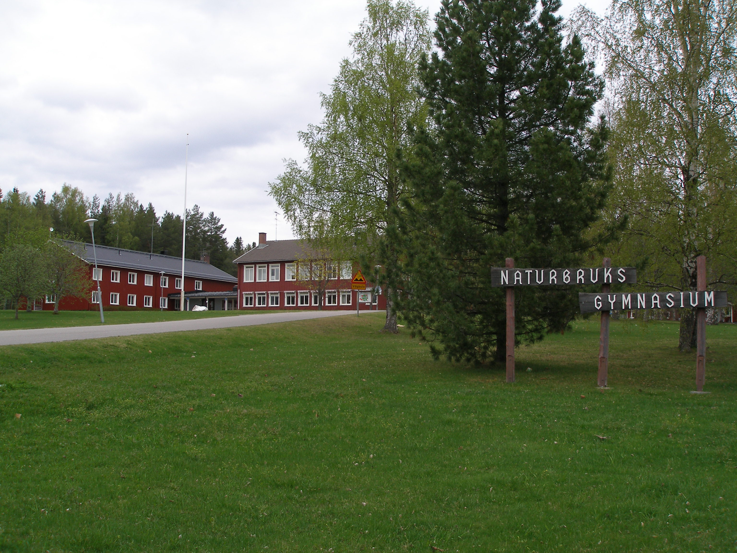 Naturbruksgymnasiet i Åbyn, Burträsk. Kommunal gymnasieskola i Skellefteå kommun, Västerbottens län.